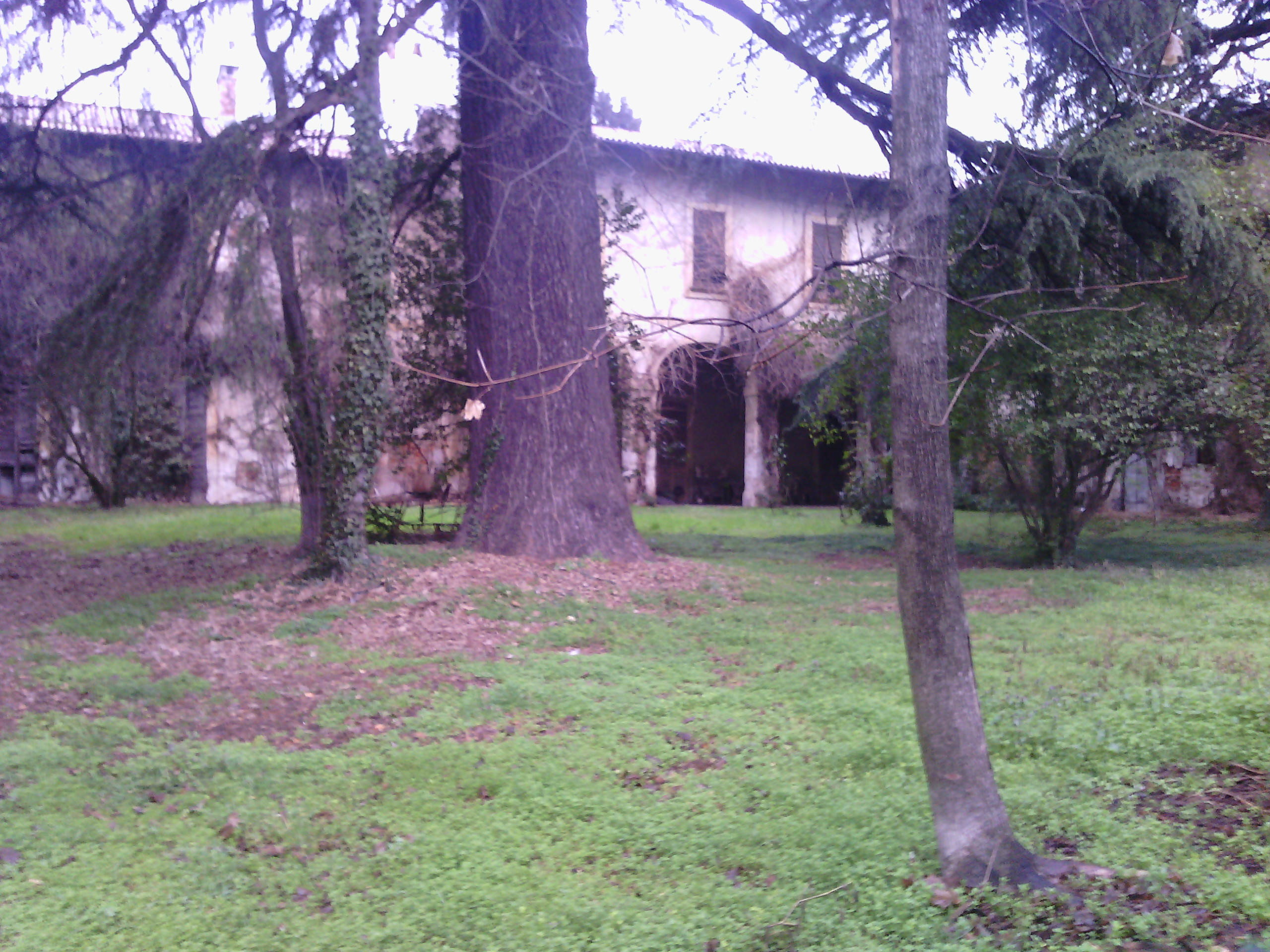 Villa Magnaghi a Mesero (MI) - Italy